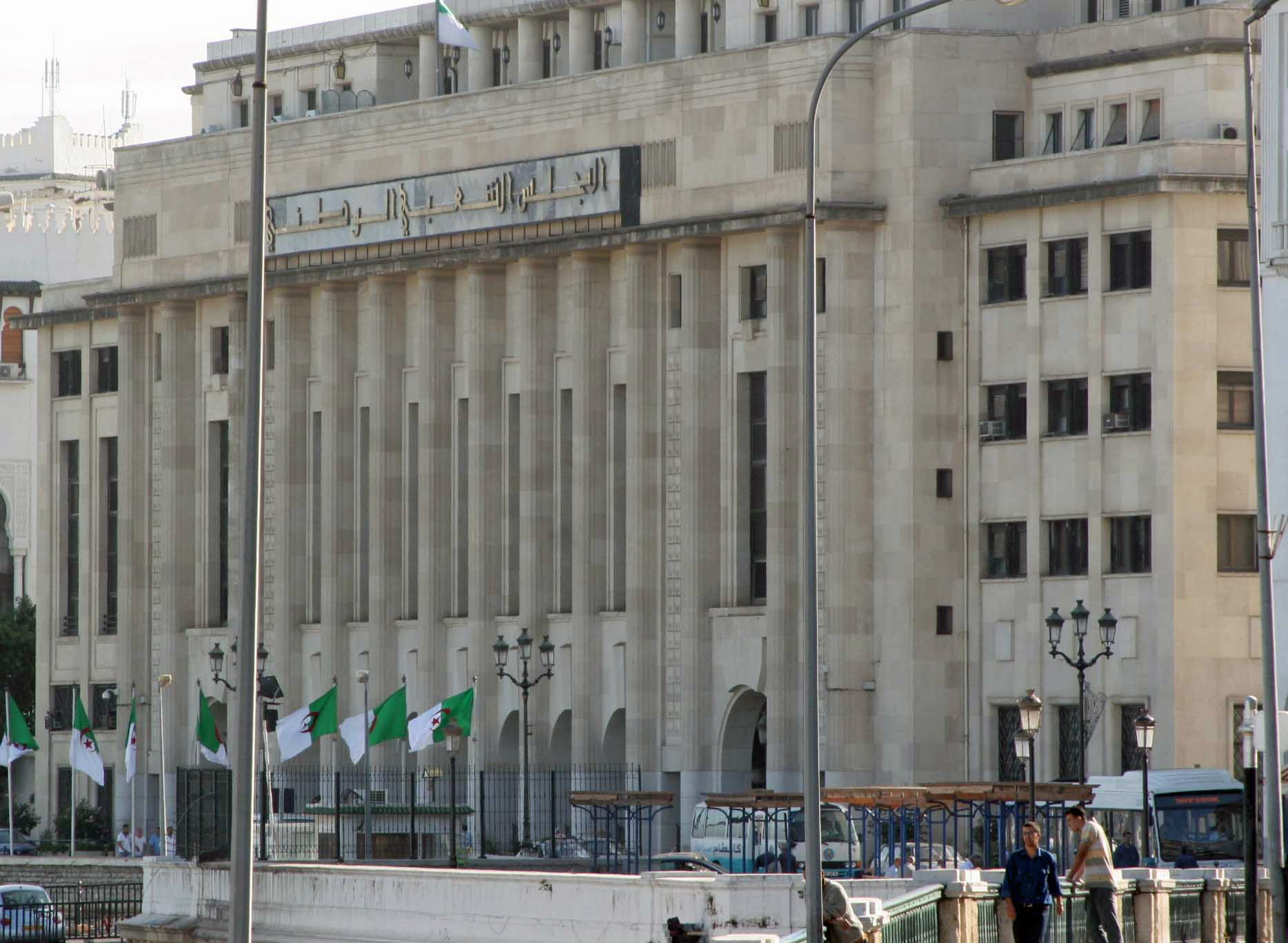 More than 25,000 candidates from 44 political parties are vying for a seat in Algeria's People's National Assembly. يتنافس أزيد من 25 ألف مرشح من 44 حزبا سياسيا على مقعد في المجلس الشعبي الوطني الجزائري. Plus de 25 000 candidats issus des rangs de 44 partis politiques s'affrontent pour un siège à l'Assemblée populaire nationale.